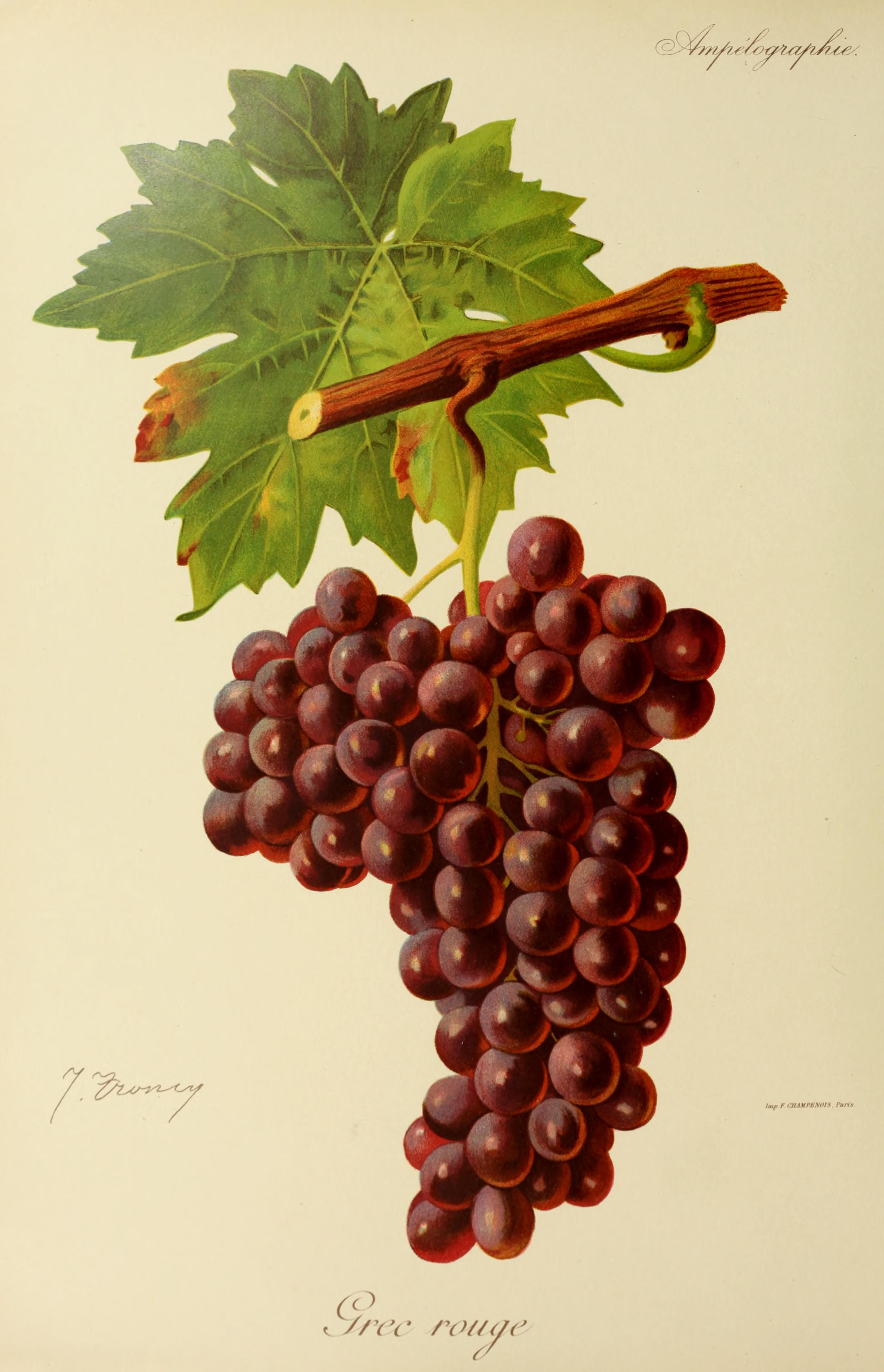 Grappe de Grec rouge par Viala et Vermorel